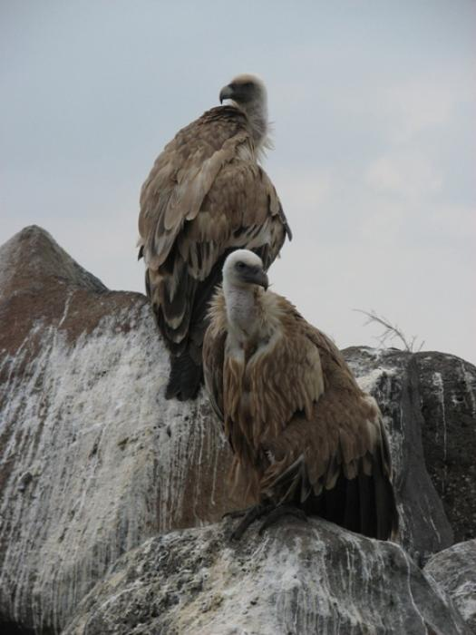 זוג נשרים בתחנת האכלה בגן לאומי כוכב הירדן